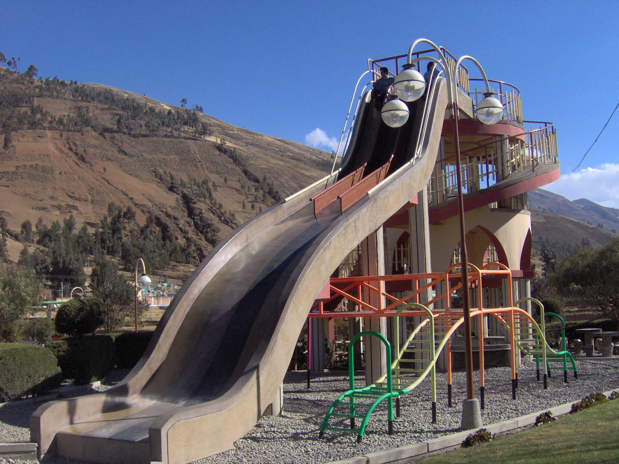 Parque Ecológico Infantil Chalampampa, Pampas Tayacaja.